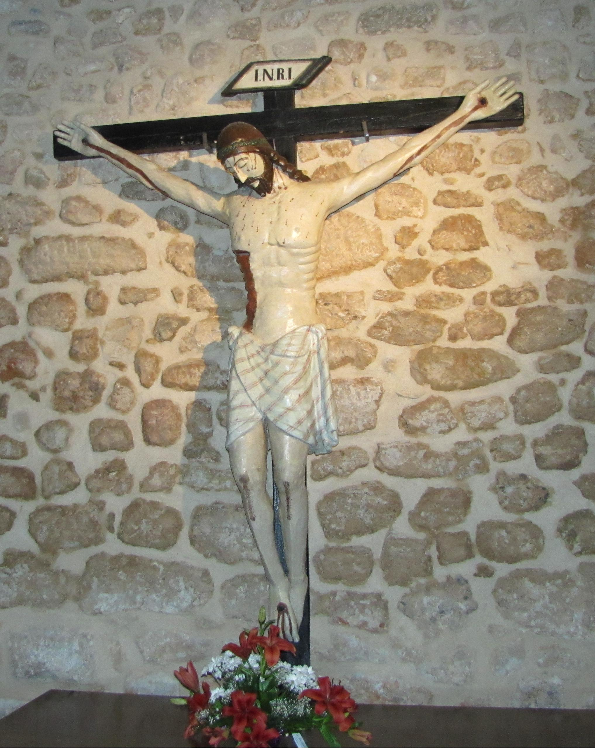 Santo Cristo del Amparo. Serón de Nágima